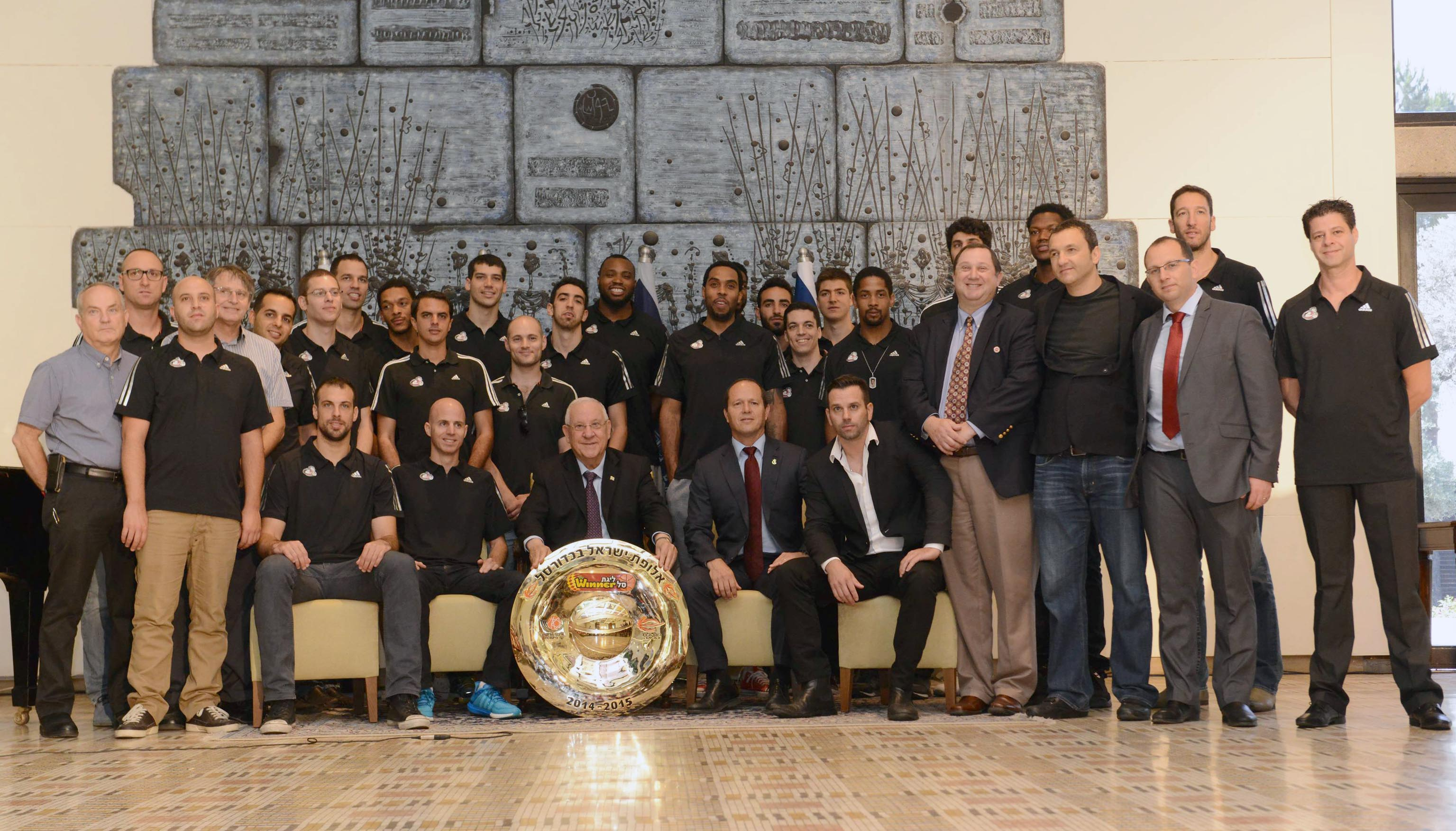 נשיא מדינת ישראל ראובן ריבלין מארח את הפועל ירושלים בכדורסל לאחר זכייתה באליפות עונת 2015